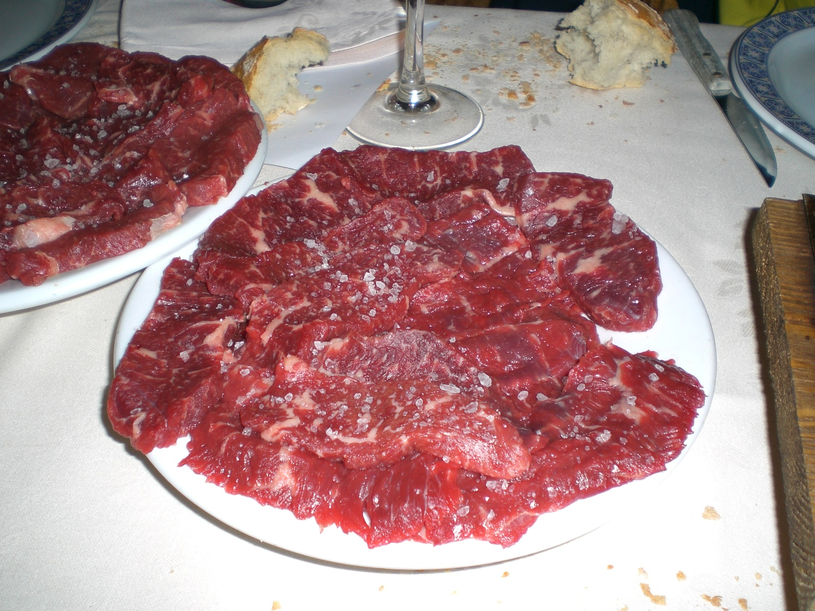 1 kg de Lomo de Buey crudo, con sal, Zumalacarregui